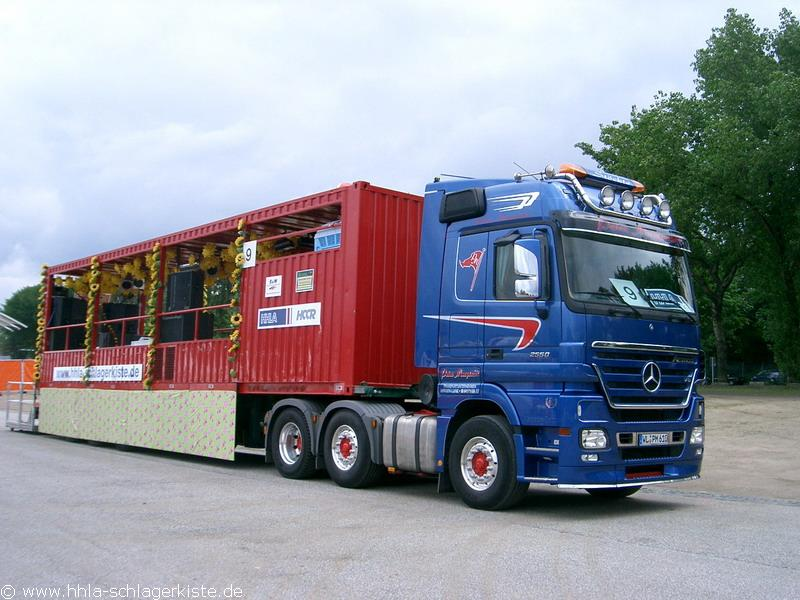 Die HHLA-Schlagerkiste vor dem Move ohne Luftballons